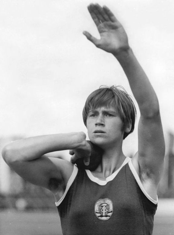 Burglinde Pollak Zentralbild Schaar 28.6.70 UdSSR: Mehrkampf-Ländervergleich zwischen der UdSSR und der DDR in Tallin (27.-28.6.)- Mit 3133 Punkten nach dem ersten Tag hat Burglinde Pollak einen beruhigenden Vorsprung in der Gesamteinzelwertung des Fünfkampfes. Burglinde Pollak gefiel vor allem mit ihren 13,7 Sekunden über 100-Meter-Hürden und ihrem Kugelstoßergebnis von 15,03 Meter (Foto von den letzten DDR-Meisterschaften).